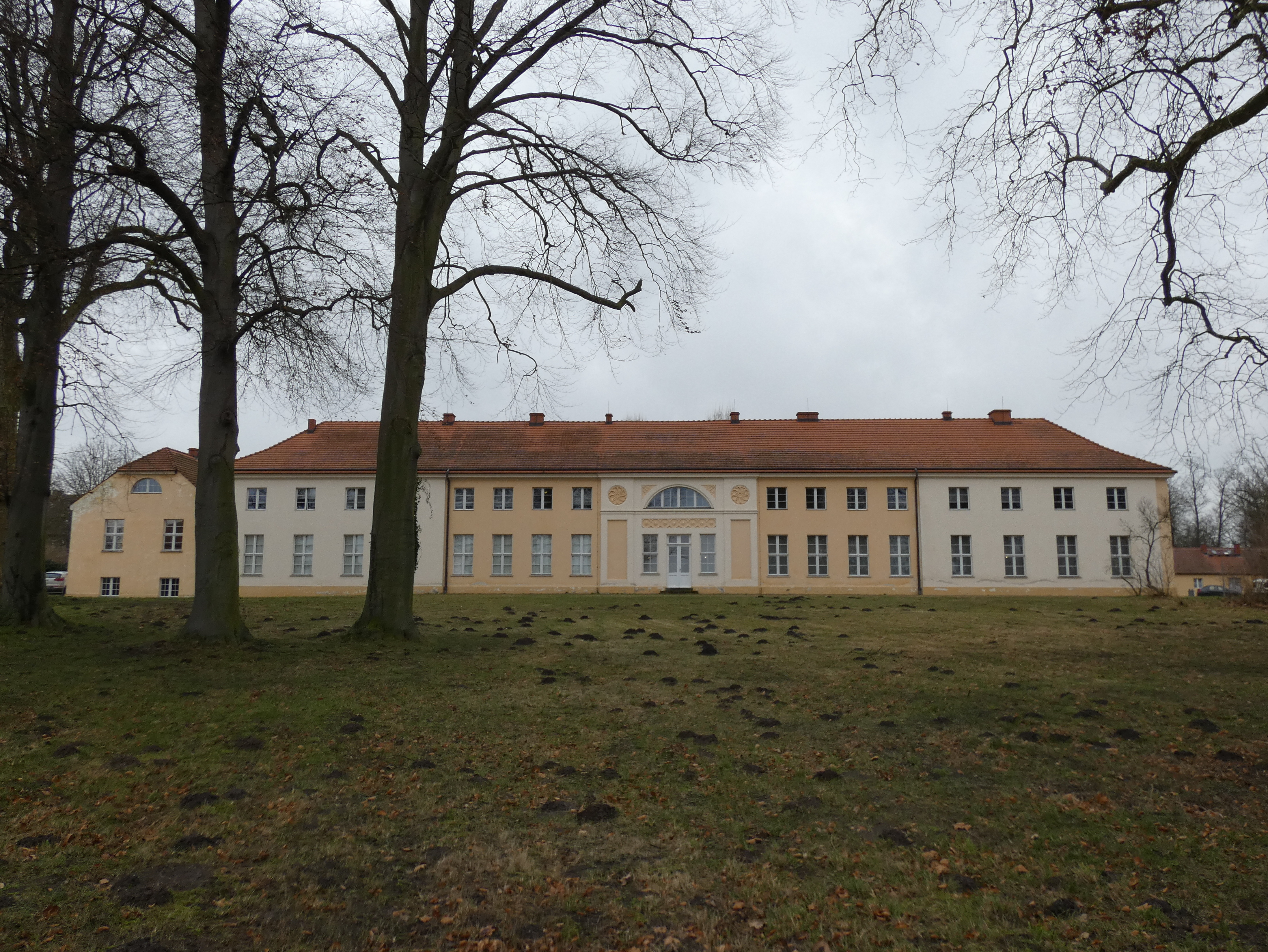 Schloss Paretz Parkseite